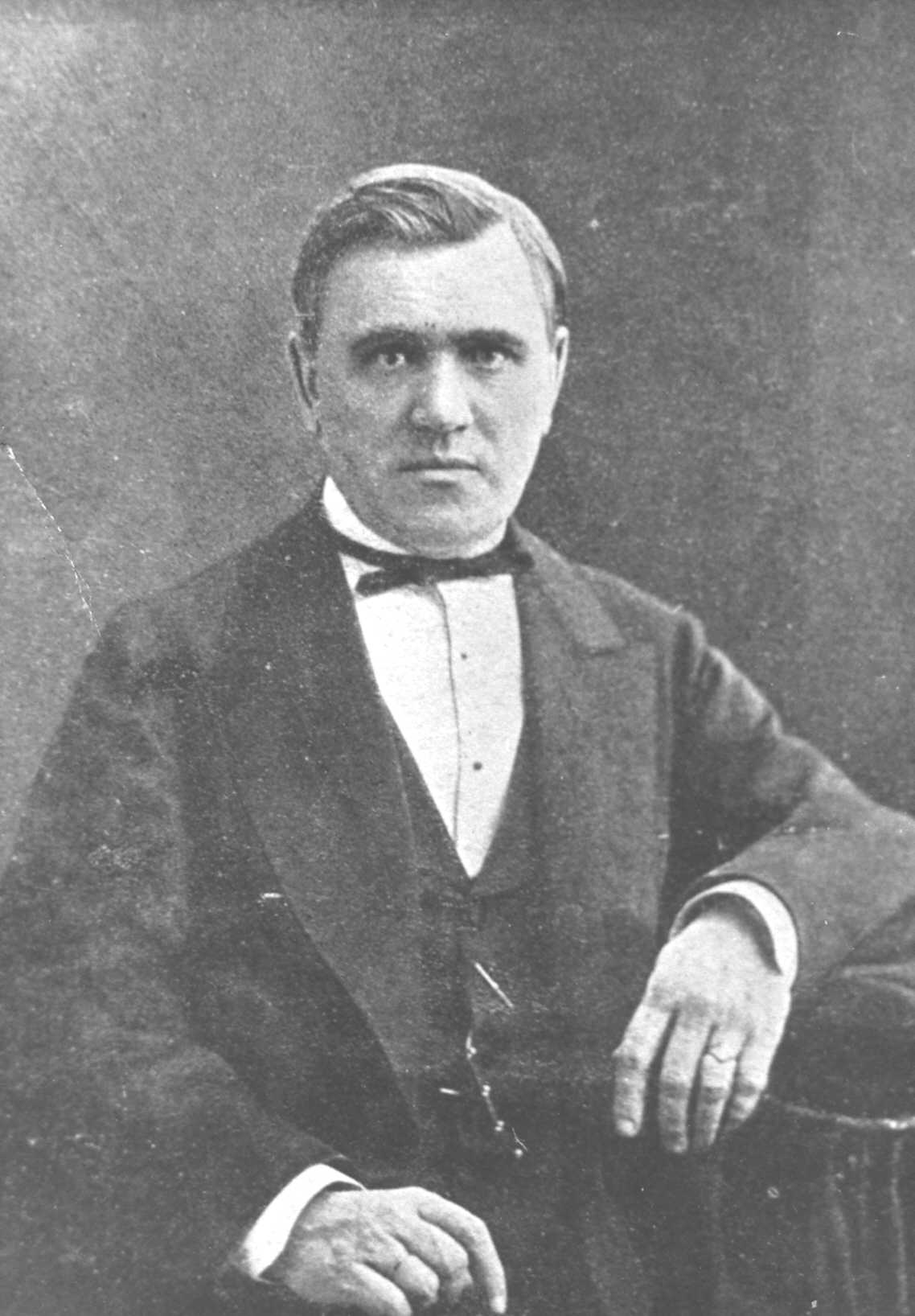 Фридрих Фридрихович Меринг